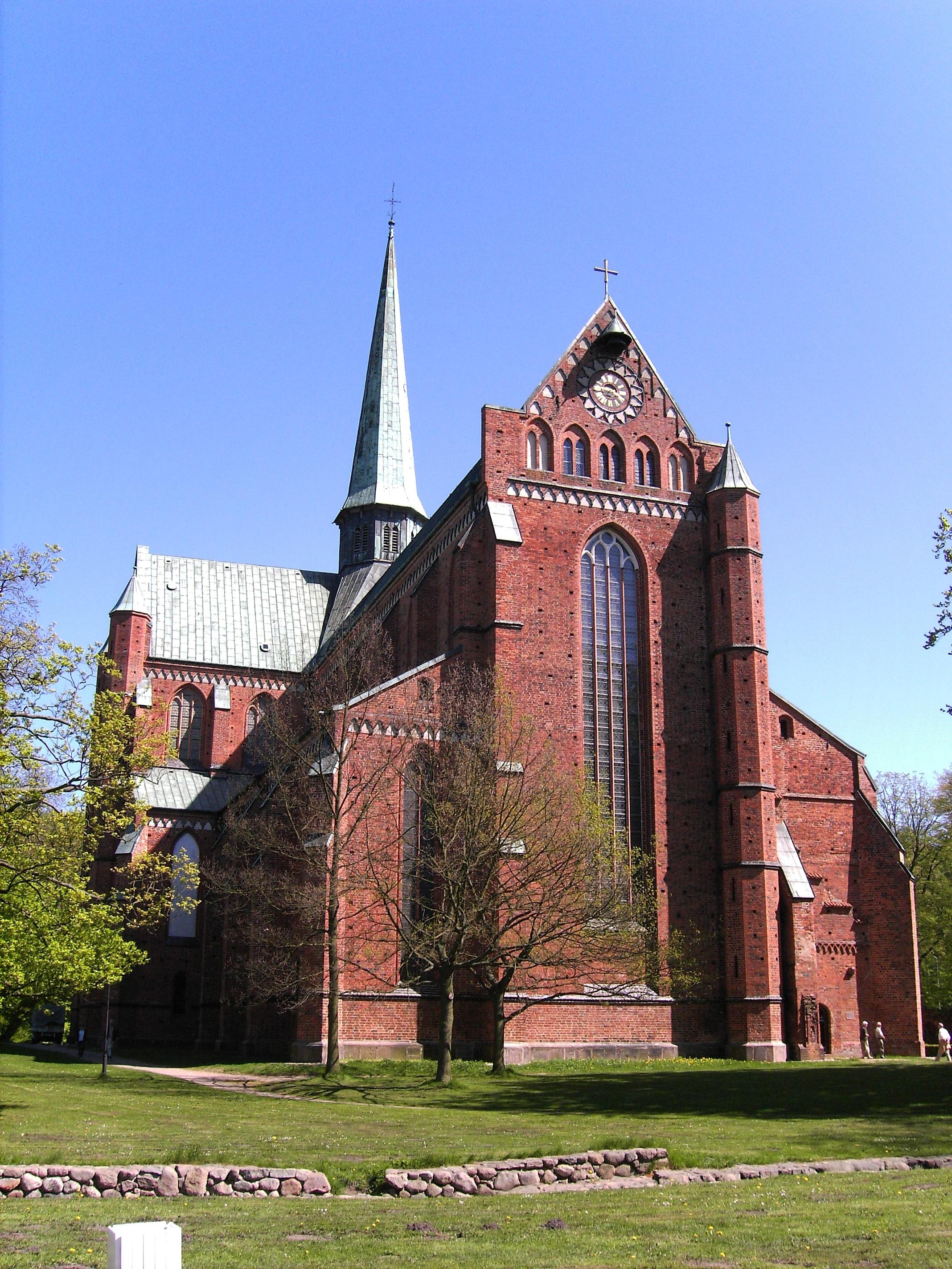 Doberaner Münster